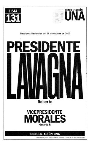 Boleta electoral - Elecciones de Argentina de 2007 - Lavagna